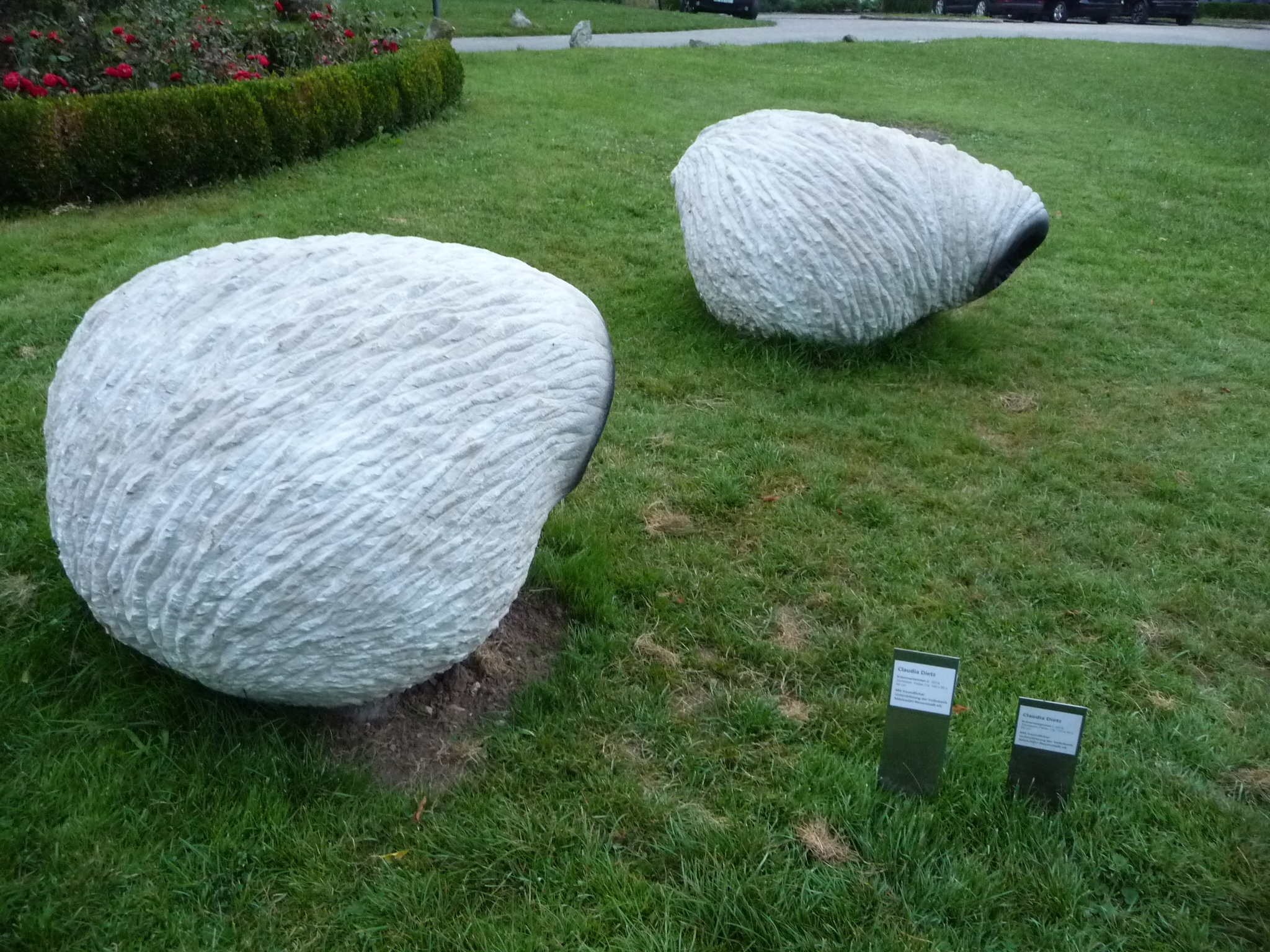 Skulpturen von Claudia Dietz (1967–) DescriptionGerman designer, sculptress and stonemasonDate of birth 1967 Location of birth Stuttgart Authority control : Q19842622 creator QS:P170,Q19842622 in Jagsthausen im Landkreis Heilbronn, nördliches Baden-Württemberg